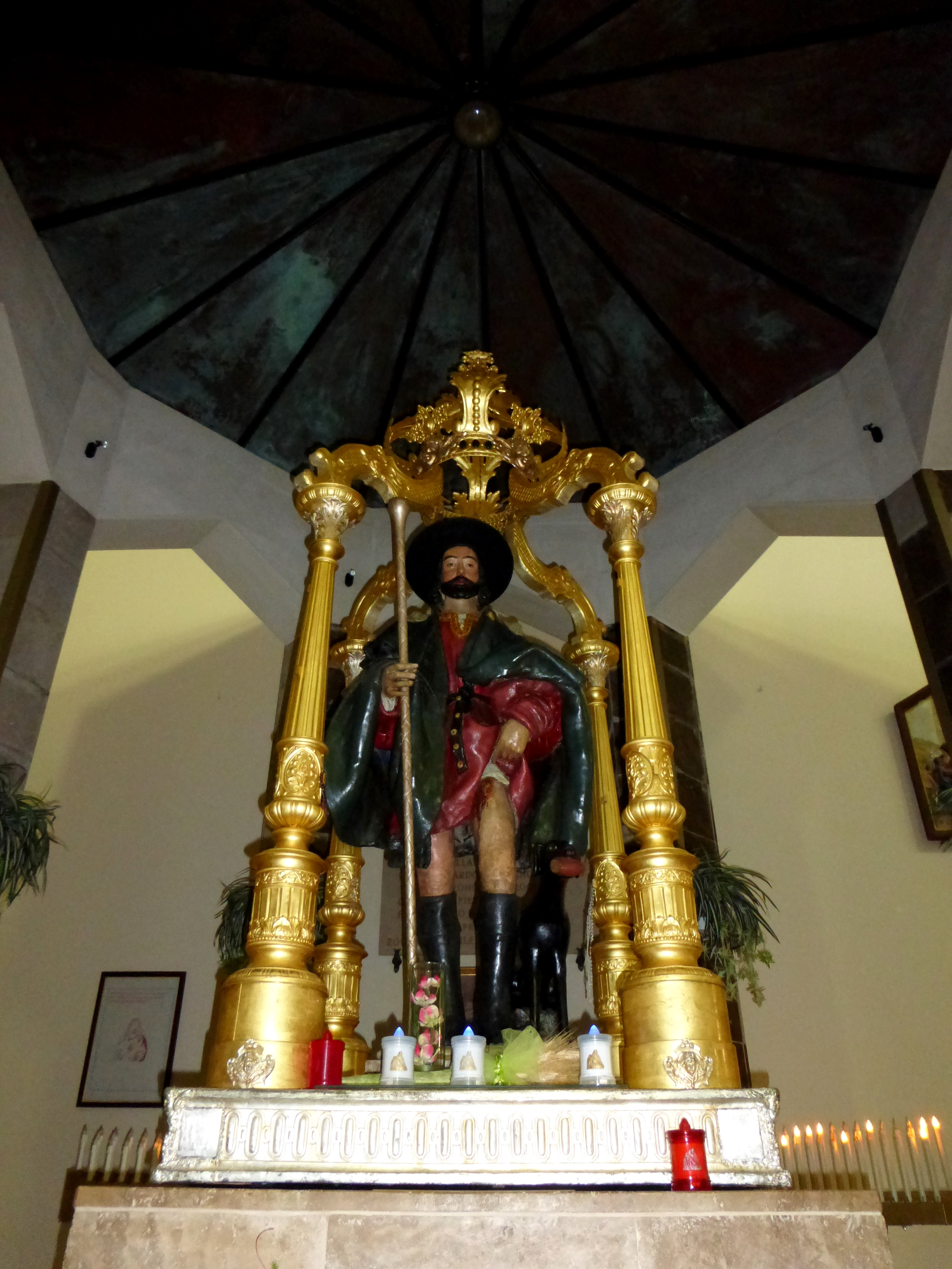 Statua nella chiesa di San Rocco a Roccamontepiano, Chieti.